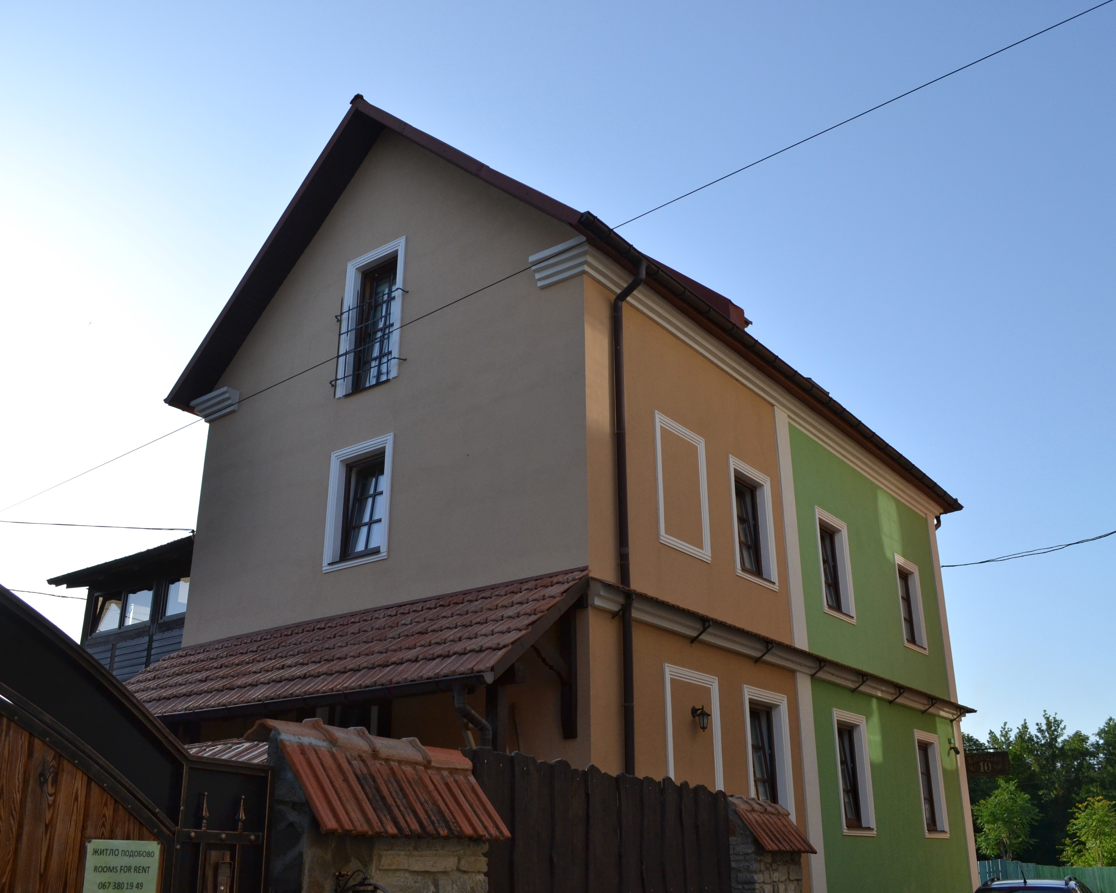 Новобудова у Старому Місті.